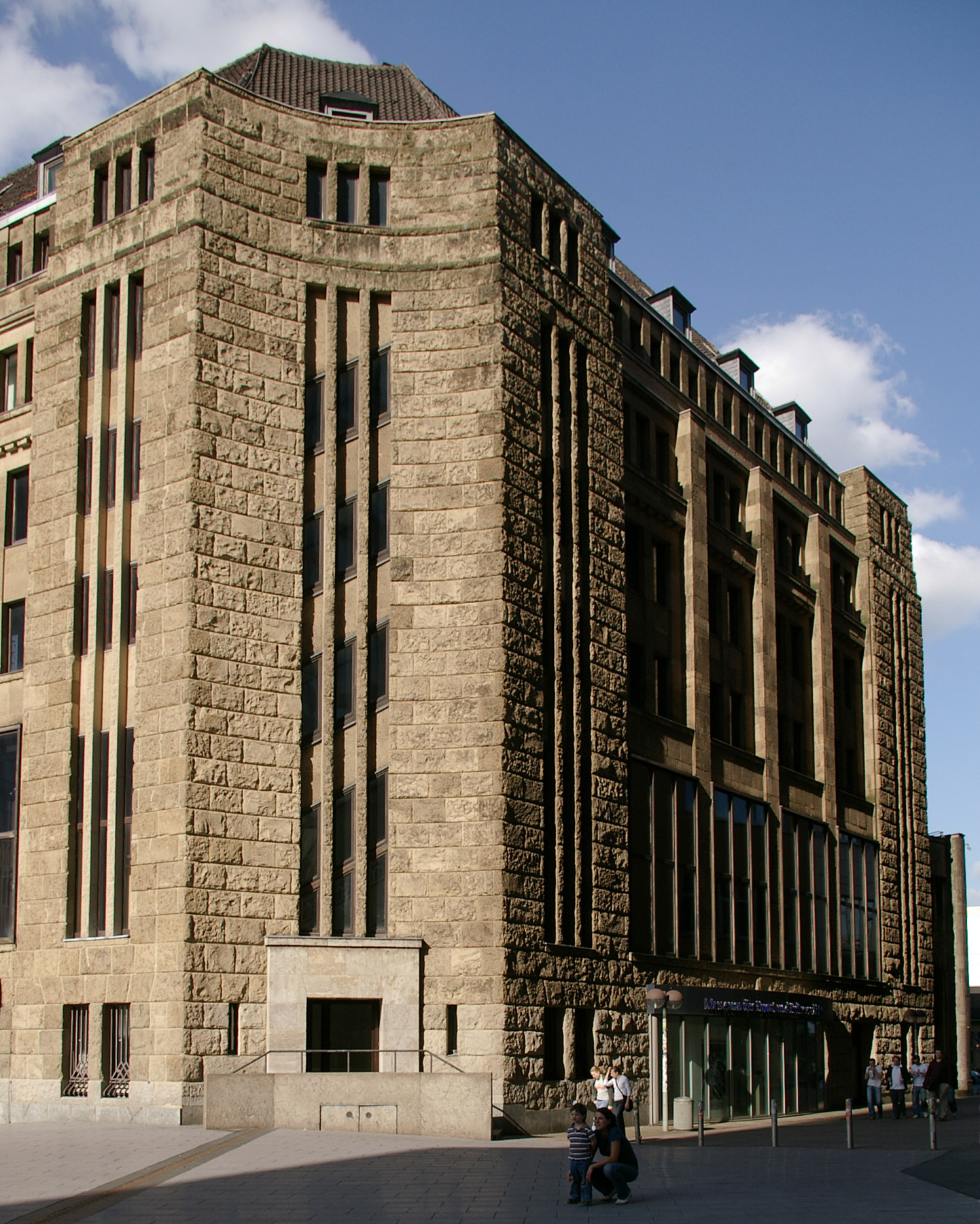 Museum für Kunst- und Kulturgeschichte Dortmund, Südfassade